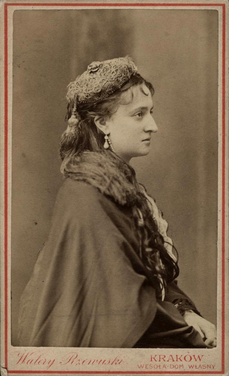 Portret Anny Potockiej (1863-1953), później żony Ksawerego Branickiego